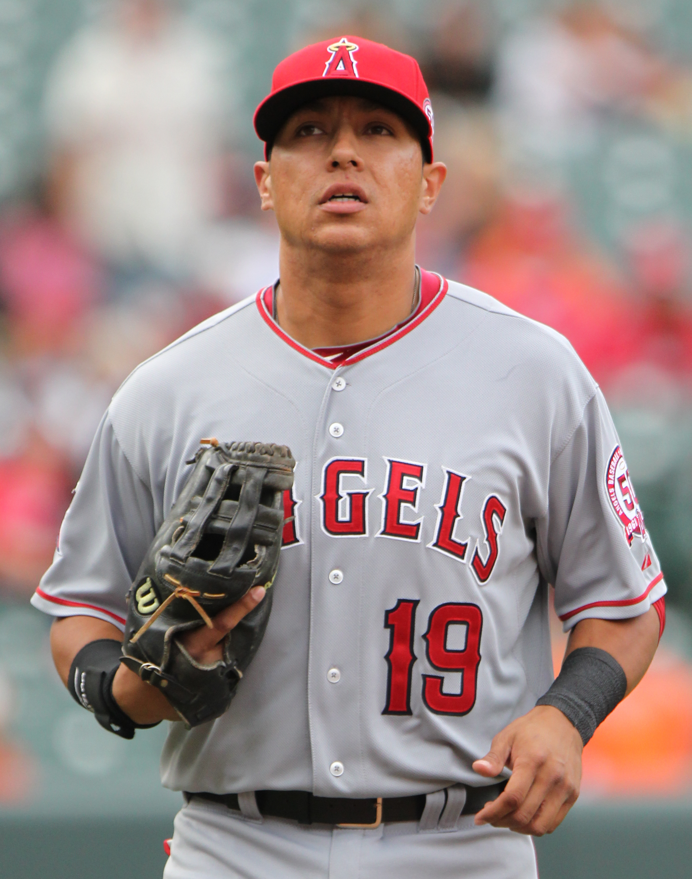 Efren Navarro